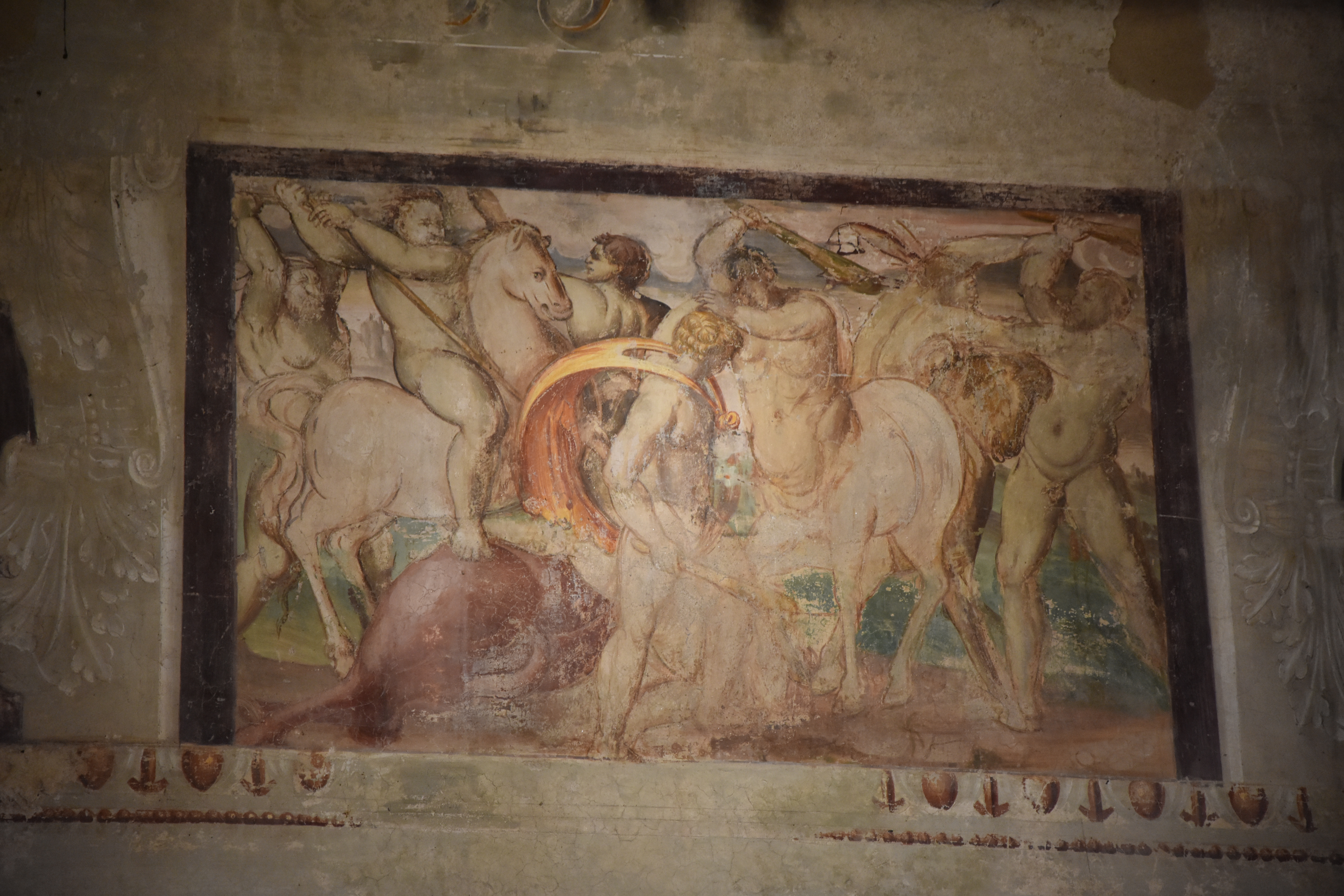 Castello di Melegnano, sala degli Argonauti, affreschi cinquecenteschi.